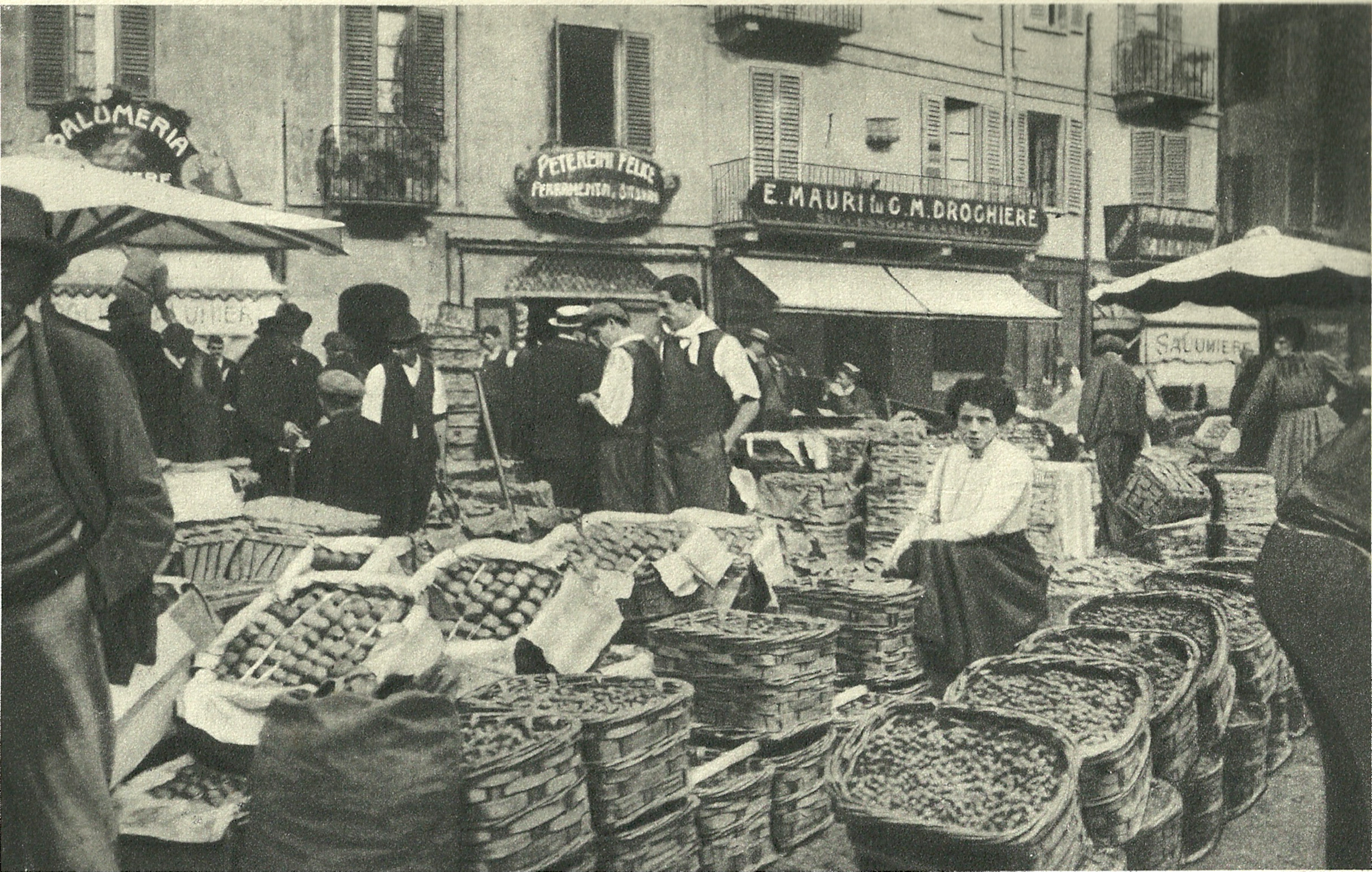 autore: anonimo fonte: Civico archivio fotografico Milano descrizione: un angolo del Verziere, ora largo Augusto, 1915/20 licenza d'uso: foto non artistica scattata in Italia oltre 20 anni fa note